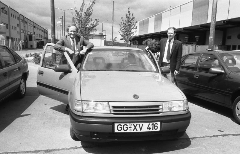 ADN-ZB/ Ludwig/25.5.90/ Bez. Erfurt: Mit dem Opel "Vectra" starten Louis R. Hughes (l), Vorstandsvorsitzender der Adam Opel AG, und Dr. Wolfram Liedke, Betriebsdirektor der Automobilwerke Eisenach, in eine gemeinsame Zukunft. Der "Vectra" soll ab 4. Quartal 1990 in Eisenach montiert werden - das viertürige GL-Modell mit 75 PS, 1,6-Liter-Einspritzmotor und geregeltem Kat wird zunächst mit 50 Stück pro Tag auf Band gelegt. Bis 1993 läuft die Produktion des Wartburg 1.3 weiter, die zu 80 Prozent für den Export vorgesehen ist.